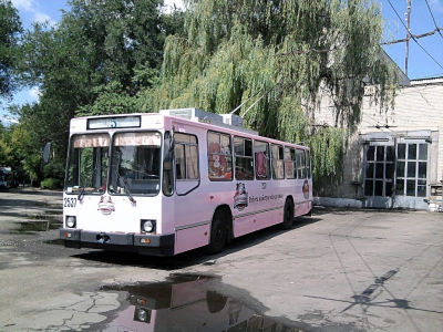 537 долго простаиваит в депо 2